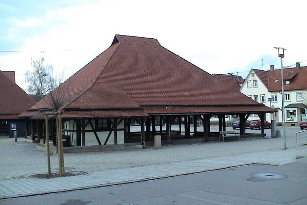 die Äußere Heiligenkelter auf dem Metzinger Kelternplatz